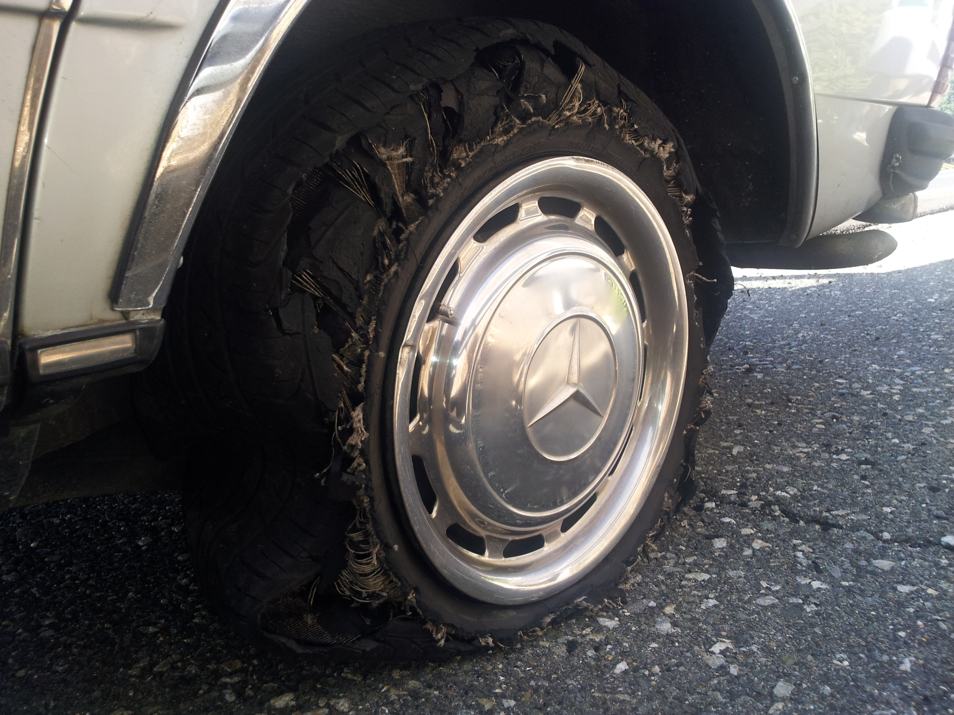 高速道路走行中バーストしたタイヤ。 195/70R14 日本製タイヤ。